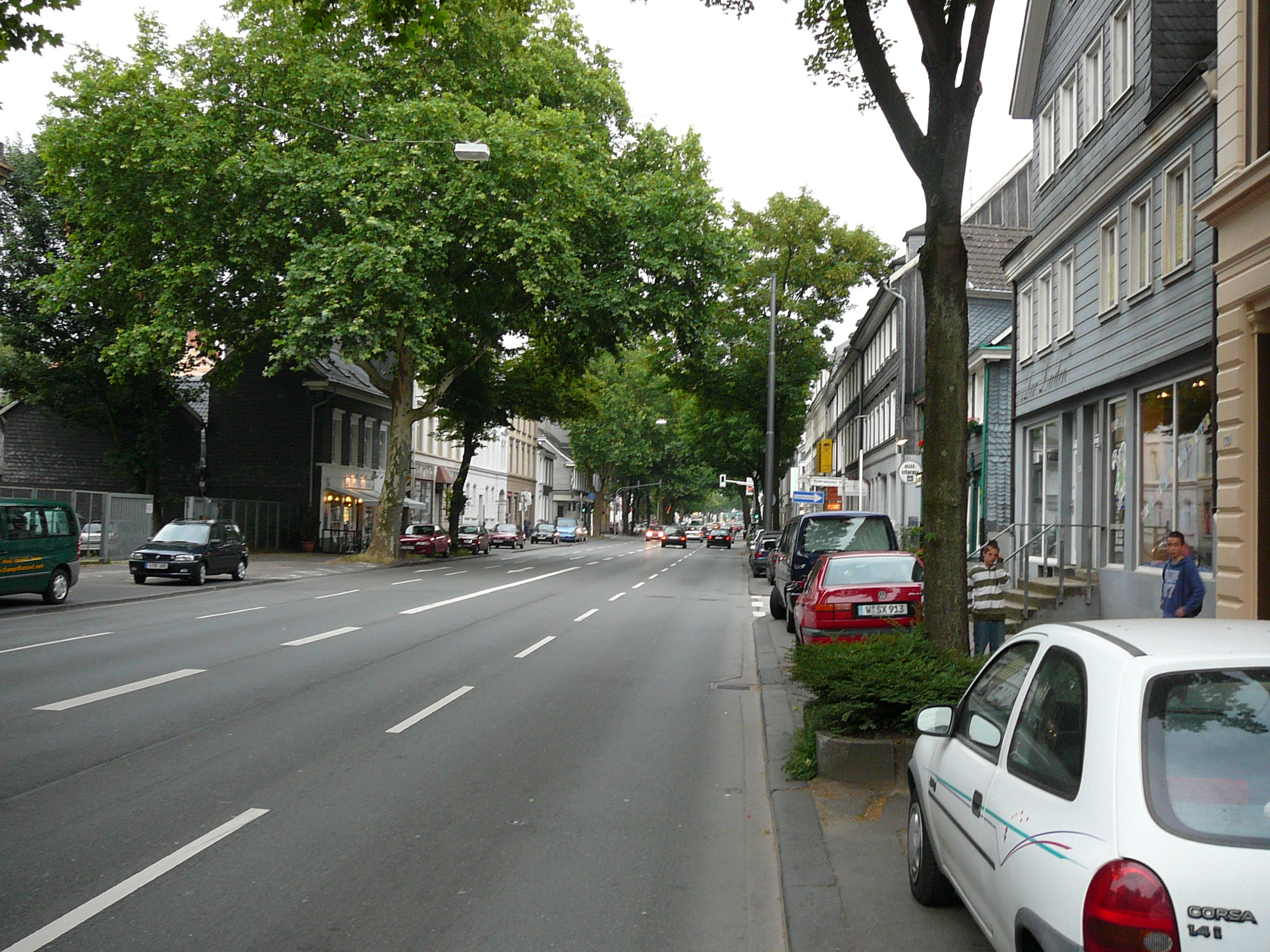 Friedrich-Engels-Allee, Wuppertal